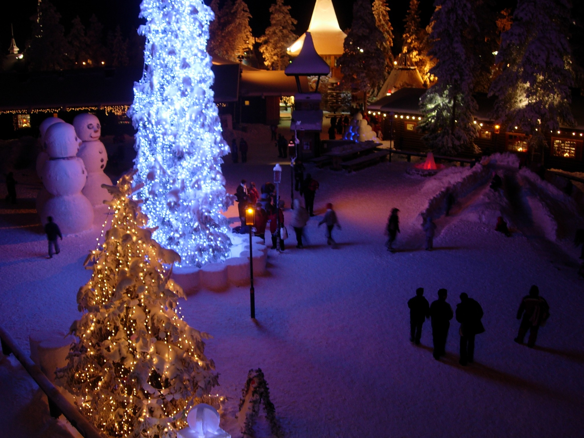 Santa Claus' Village